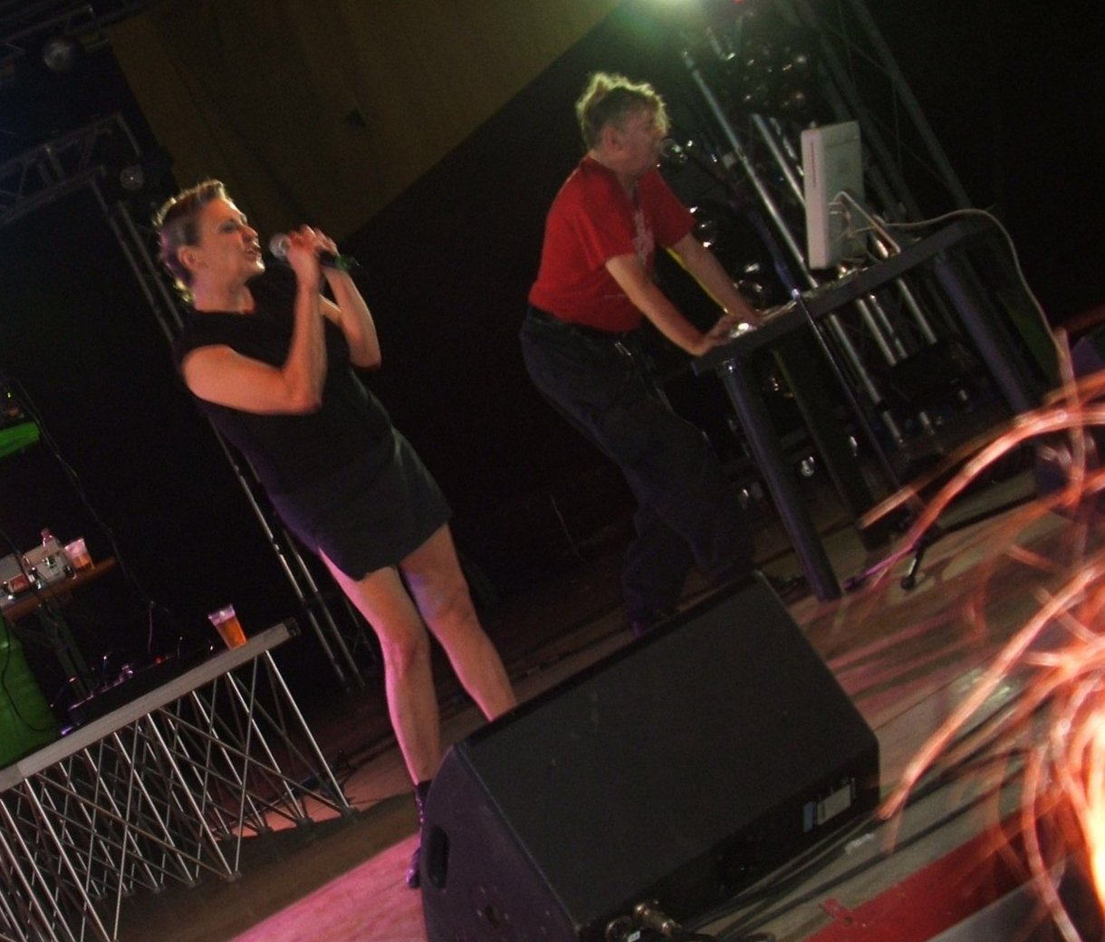 Krisma in concerto a Pasian di Prato (UD) il 9 giugno 2007.